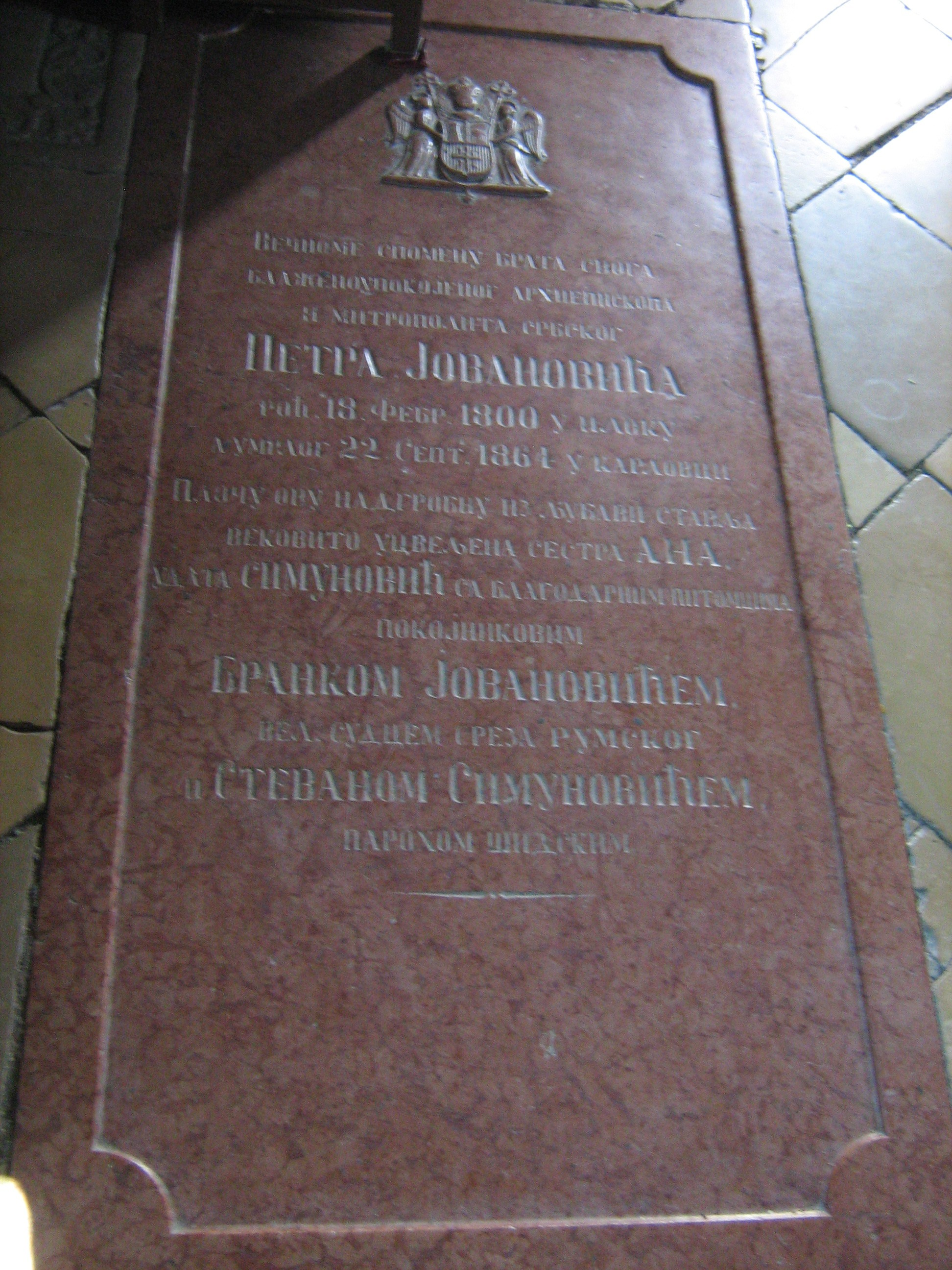 гроб митрополита Петра Јовановића у цркви